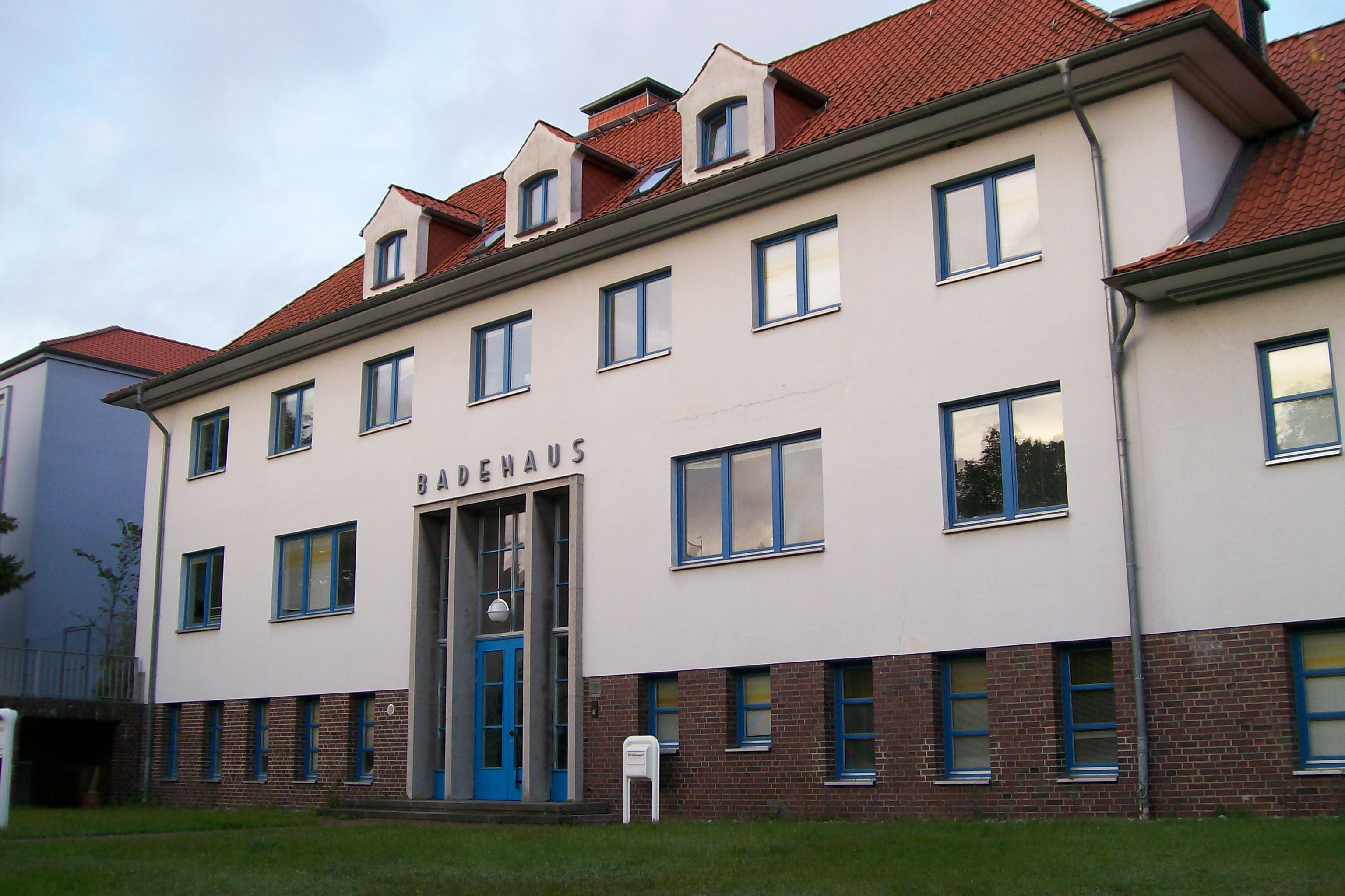 Ehemaliges Badehaus in der Hochofenstraße Lübeck-Herrenwyk